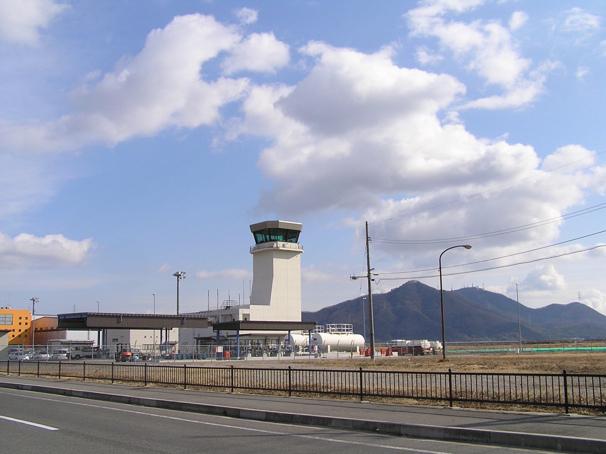 kounan airport 1(岡南飛行場)